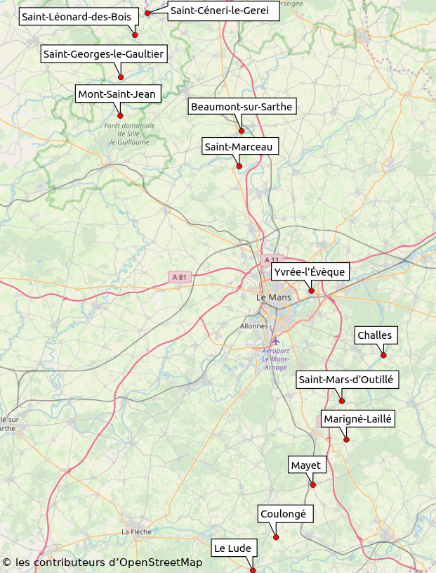 L'itinéraire en lui-même est soumis au droit d'auteur et ne peut donc être apposé sur un fond OSM.